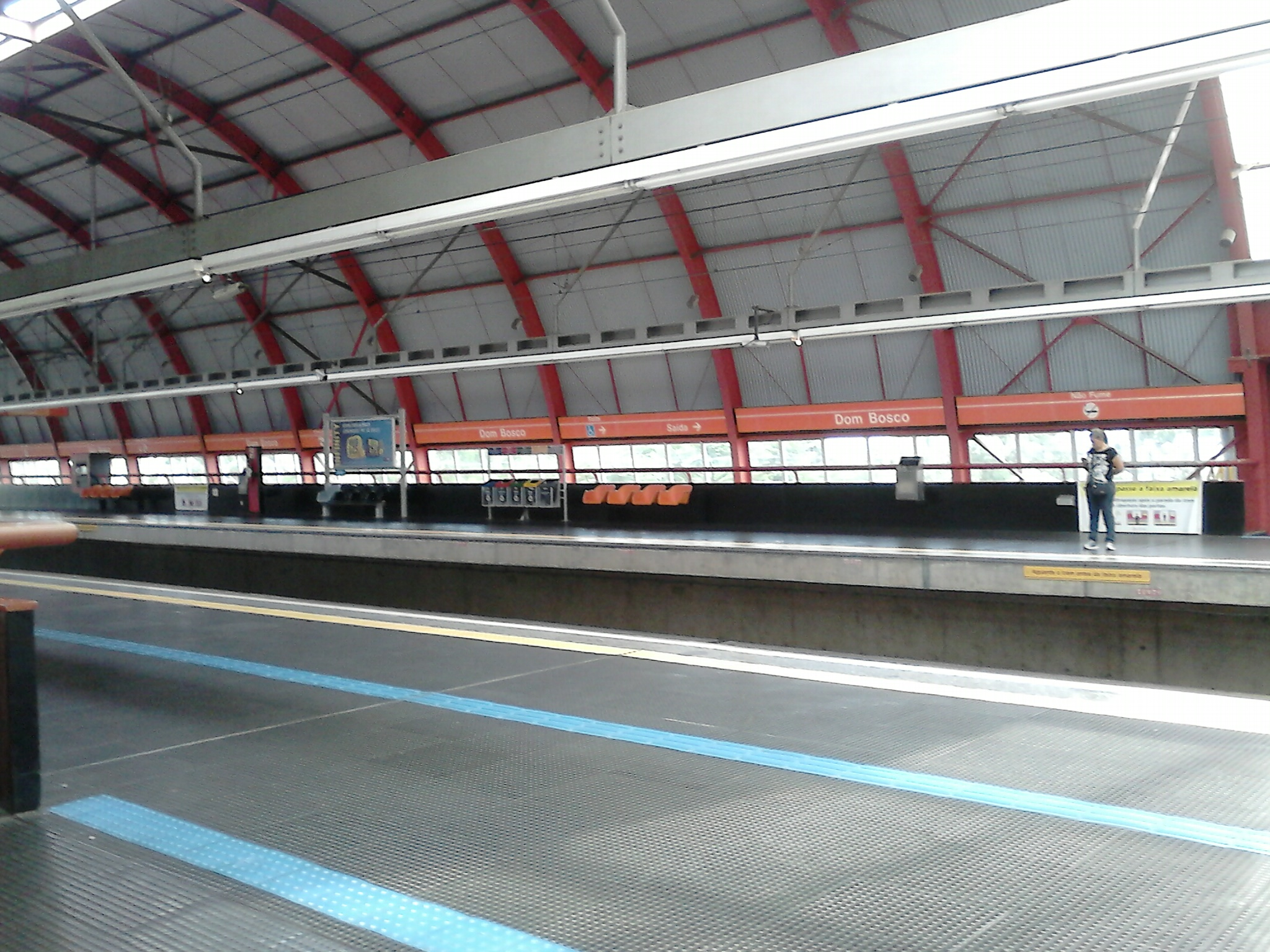 Plataforma da Estação Dom Bosco da Linha 11 - Coral